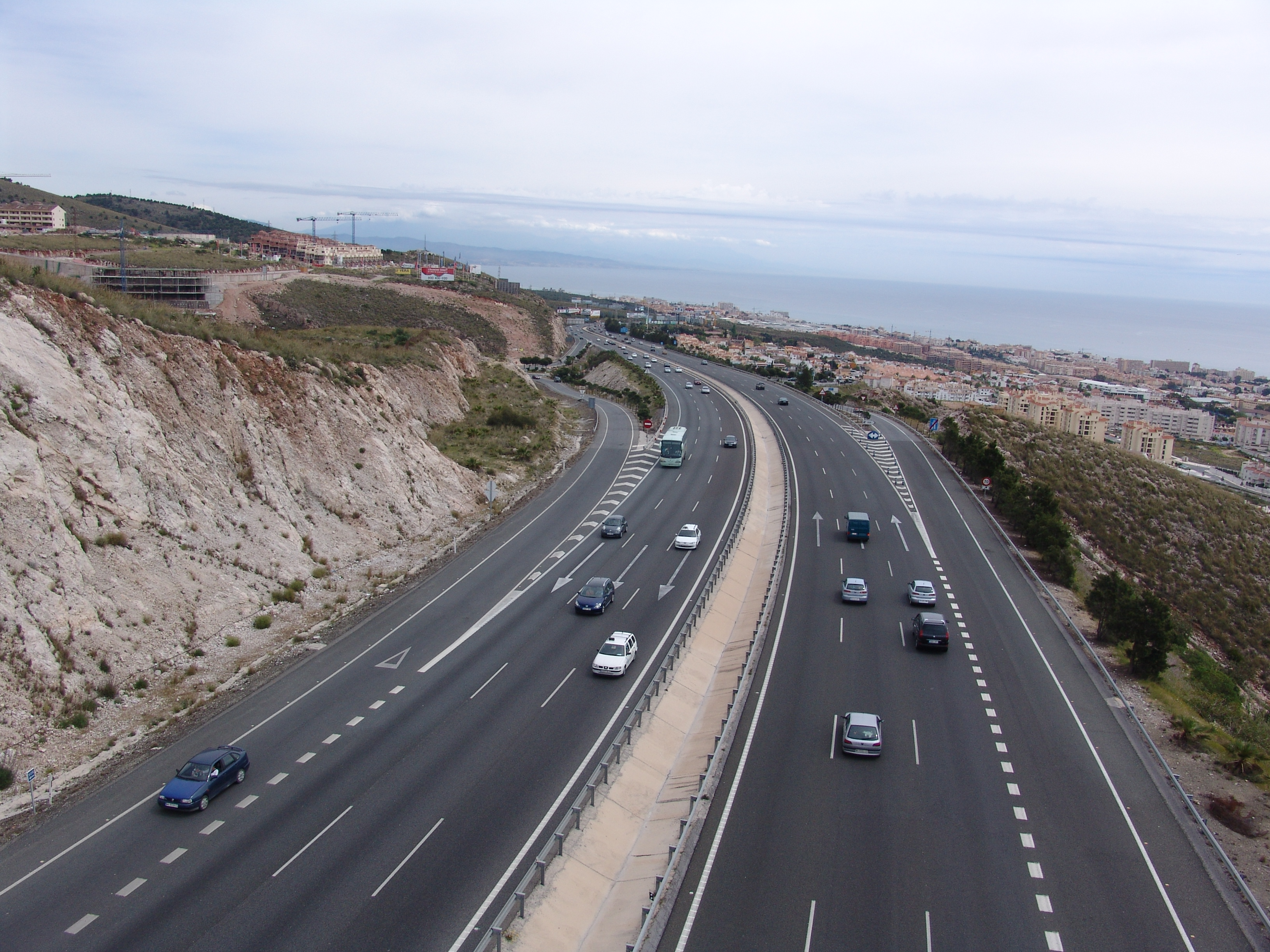 Autopista A-7 a su paso por Benalmádena (Málaga). Dirección Algeciras-Málaga. Fotografía tomada desde el teleférico de Benalmádena. A-7 through Benalmádena (Málaga, Spain). Photograph by comakut.